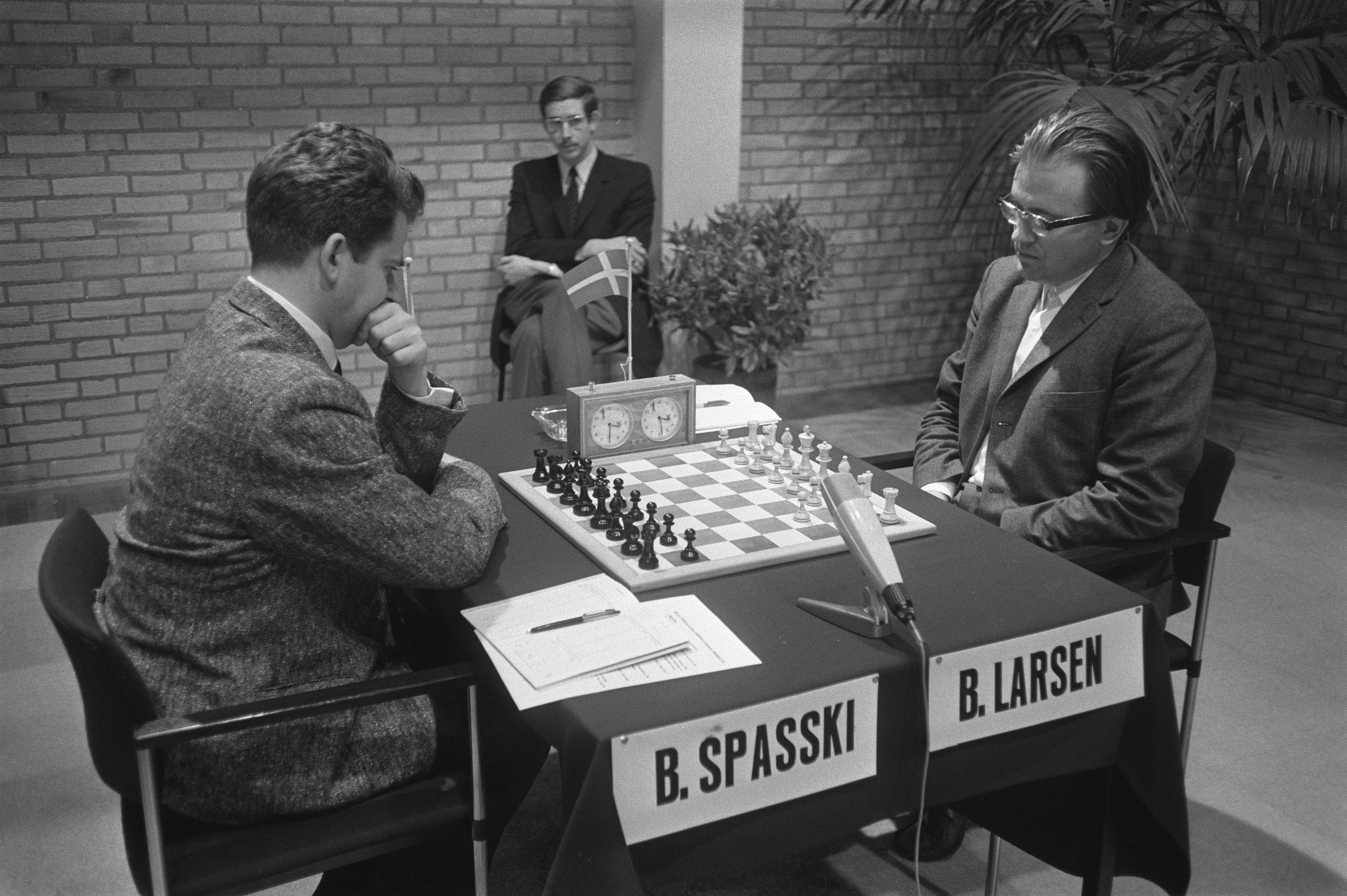 Collectie / Archief : Fotocollectie Anefo Reportage / Serie : Schaakvierkamp 1970 in Leiden Beschrijving : Spassky (links) en Larsen Annotatie : Spassky werd wereldkampioen Datum : 17 april 1970 Locatie : Leiden, Zuid-Holland Trefwoorden : schaken, toernooien , wedstrijden Persoonsnaam : Larsen, Bent, Spassky, Boris Fotograaf : Fotograaf Onbekend / Anefo Auteursrechthebbende : Nationaal Archief Materiaalsoort : Negatief (zwart/wit) Nummer archiefinventaris : bekijk toegang 2.24.01.05 Bestanddeelnummer : 923-4497